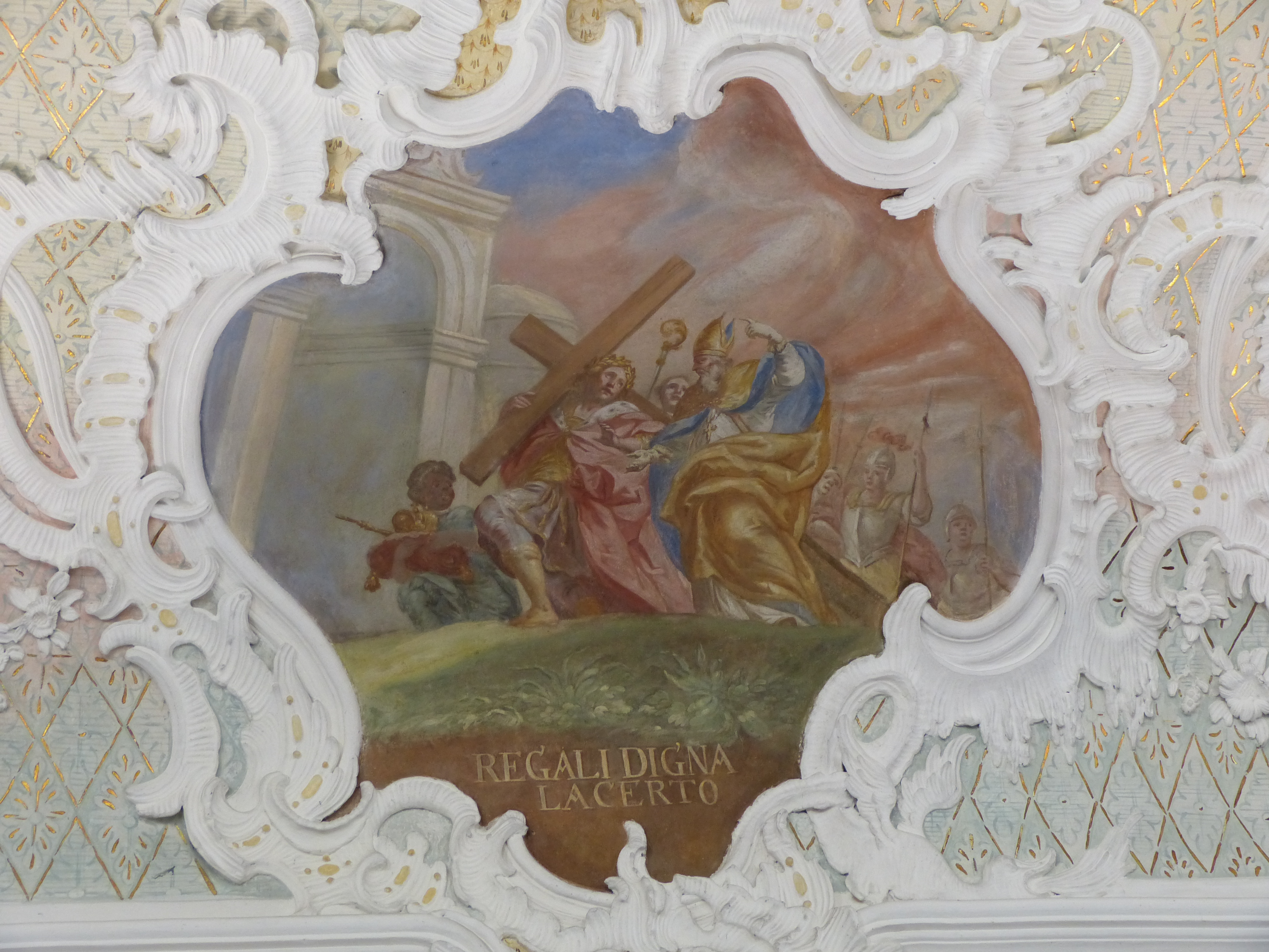 St. Bartholomäus und Hl. Kreuz, Hausen, Landkreis Unterallgäu, Bayern